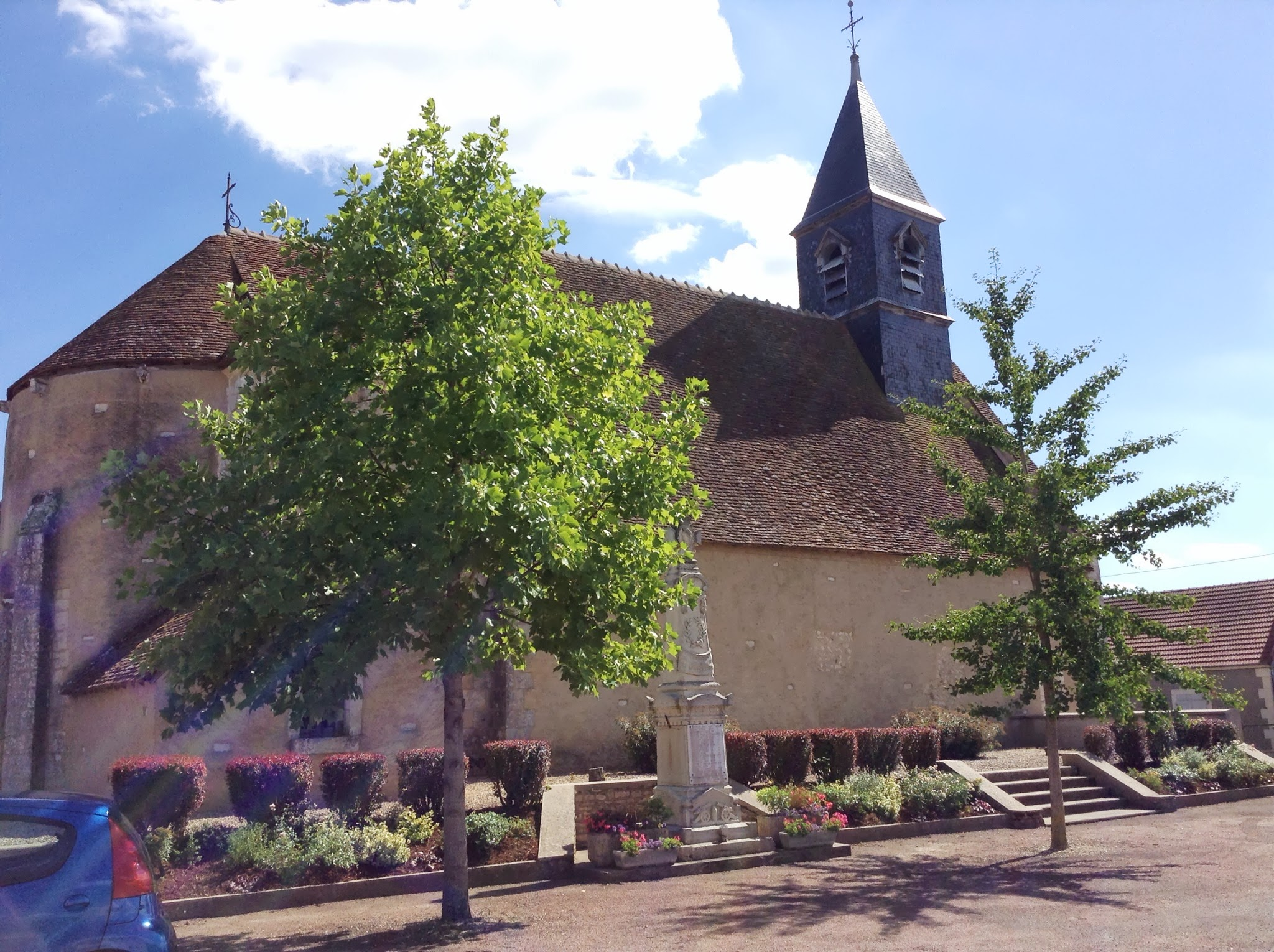 Église Saint-Pierre de Chambon (Cher)